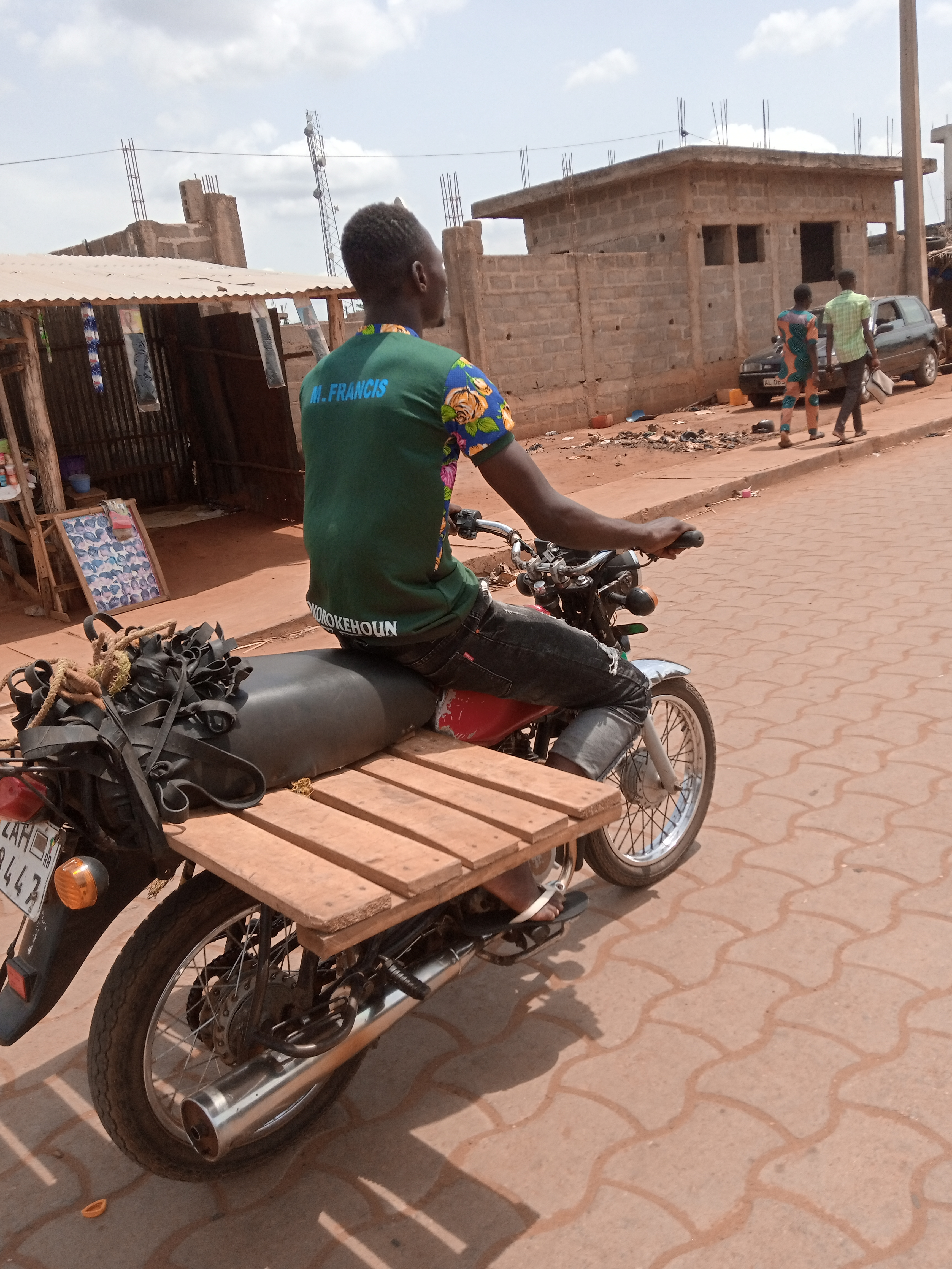 un taximan à Pobé au Bénin This is an image with the theme "Africa on the Move or Transport" from: Benin